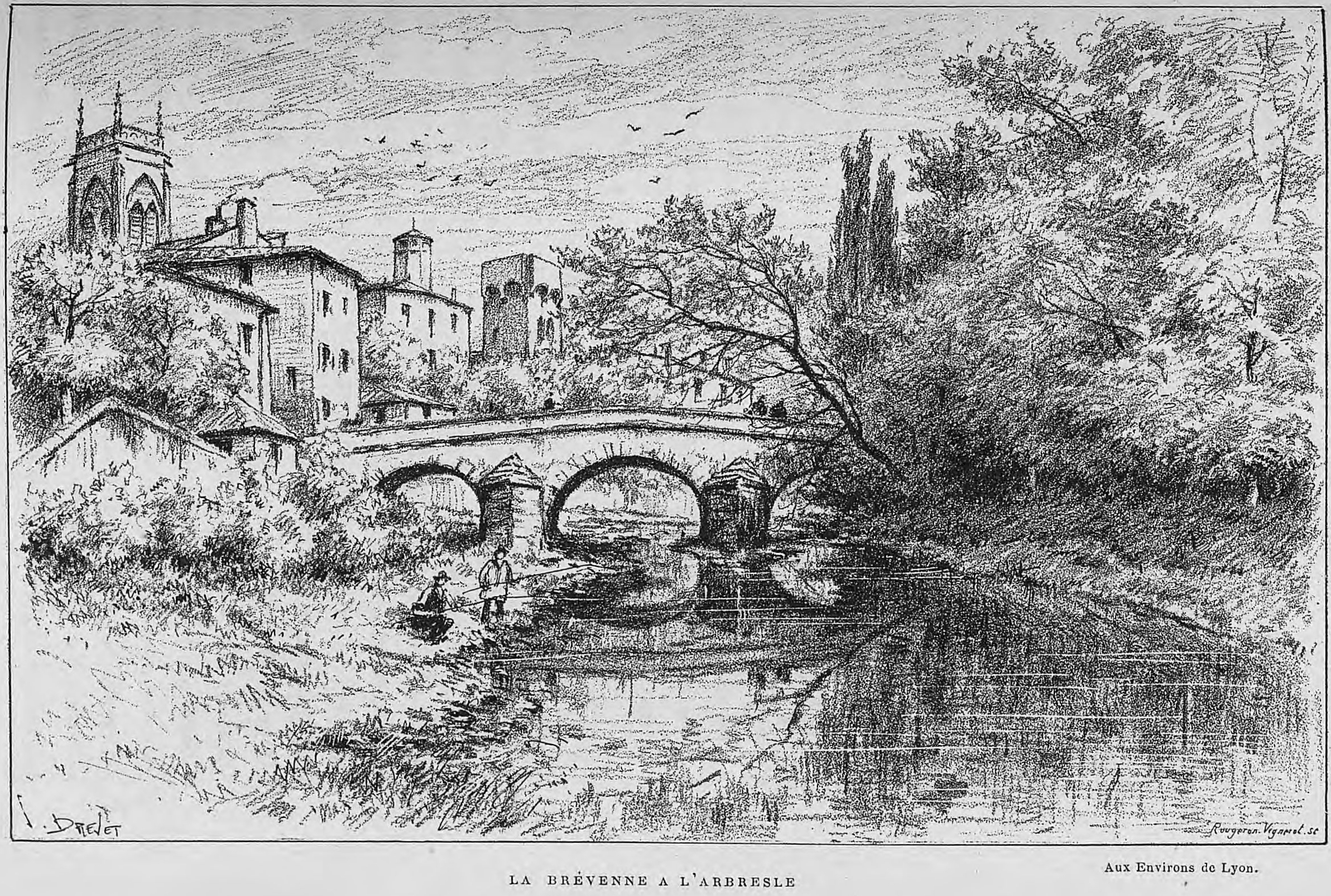 Aux environs de Lyon / Monsieur Josse ; préface de M. Coste-Labaume ; édition illustrée de 250 dessins de J. Drevet.